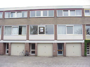 Huidige architectuur Amsterdam Noord.